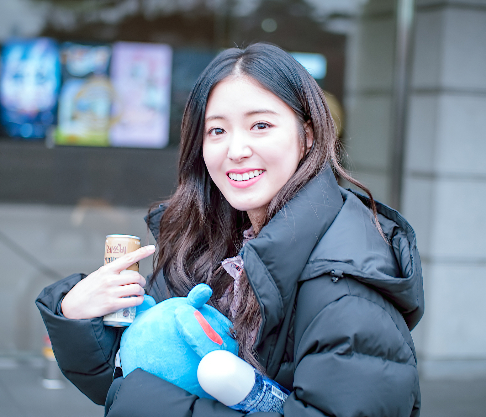 170204 KBS 해피투게더 퇴근 이세영 직찍 BY Junie